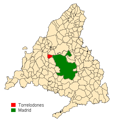 Mapa de situación de Torrelodones en la Comunidad de Madrid